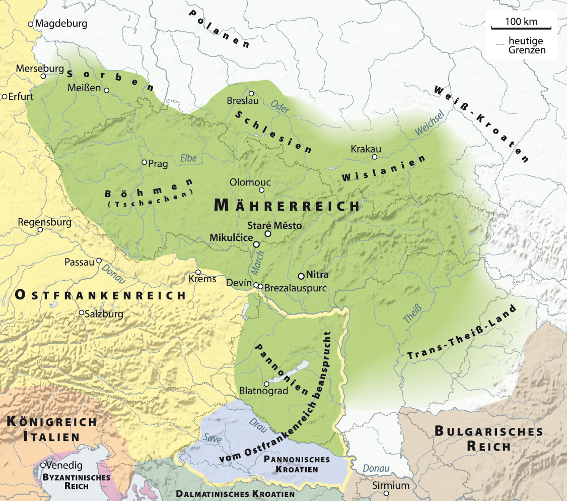 Karte des Mährerreichs unter Svatopluk I. Die Darstellung der Gewässer entspricht dem heutigen Stand.